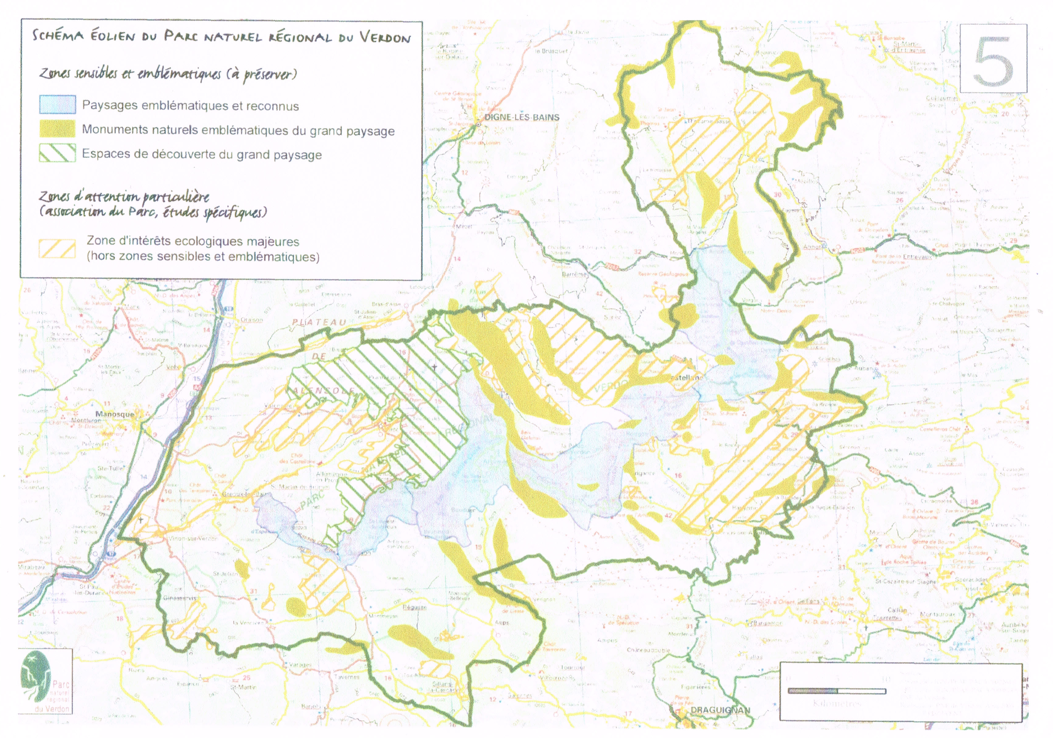 Schéma éolien du Parc naturel régional du Verdon. Réponse au courrier de l'Association de Protection des Paysages du Haut-Var (annexe à la lettre du 22 septembre du directeur du PNRV)